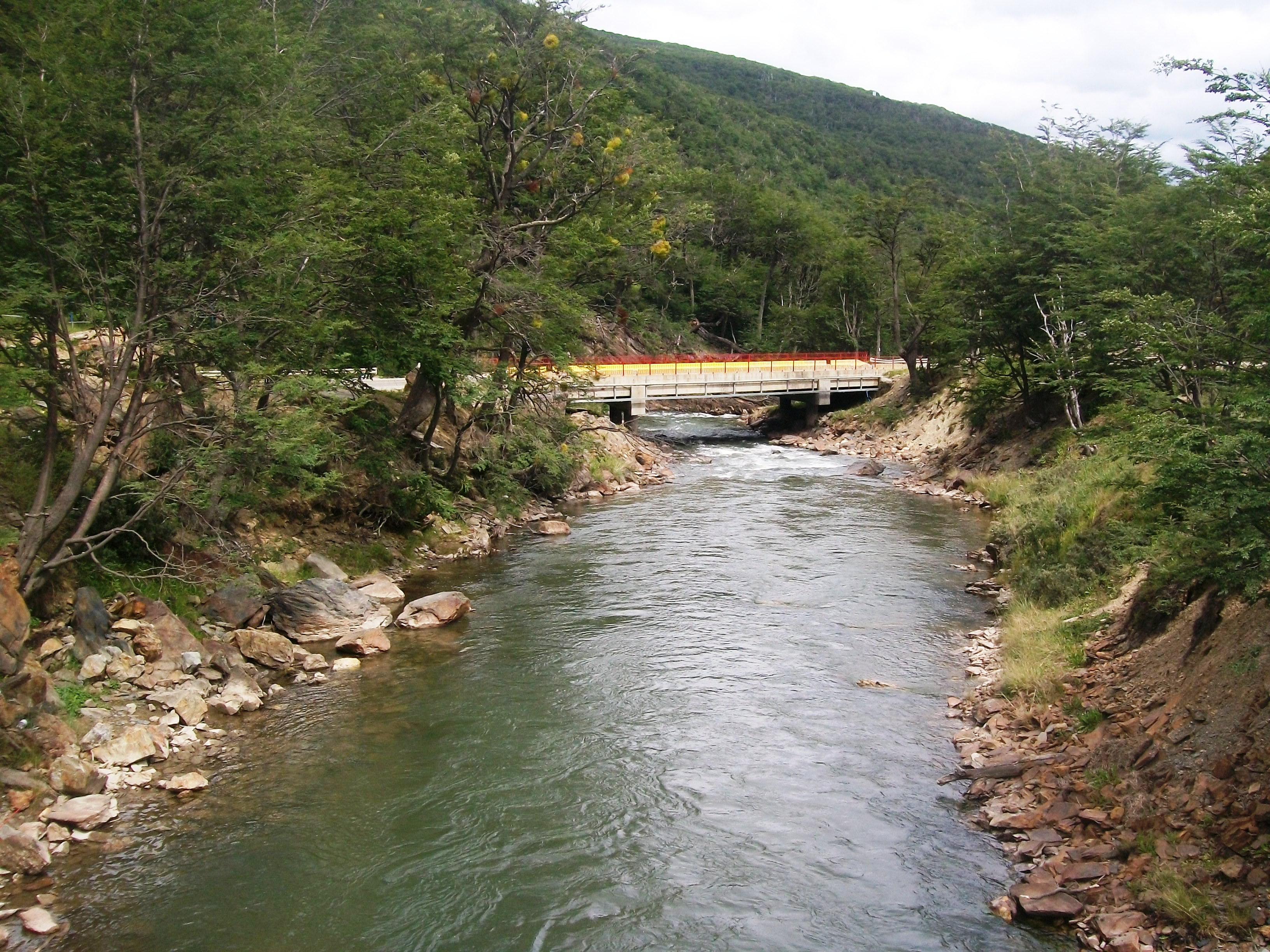 Vista del puente sobre la ruta 3 del río Olivia en Tierra del Fuego, Argentina